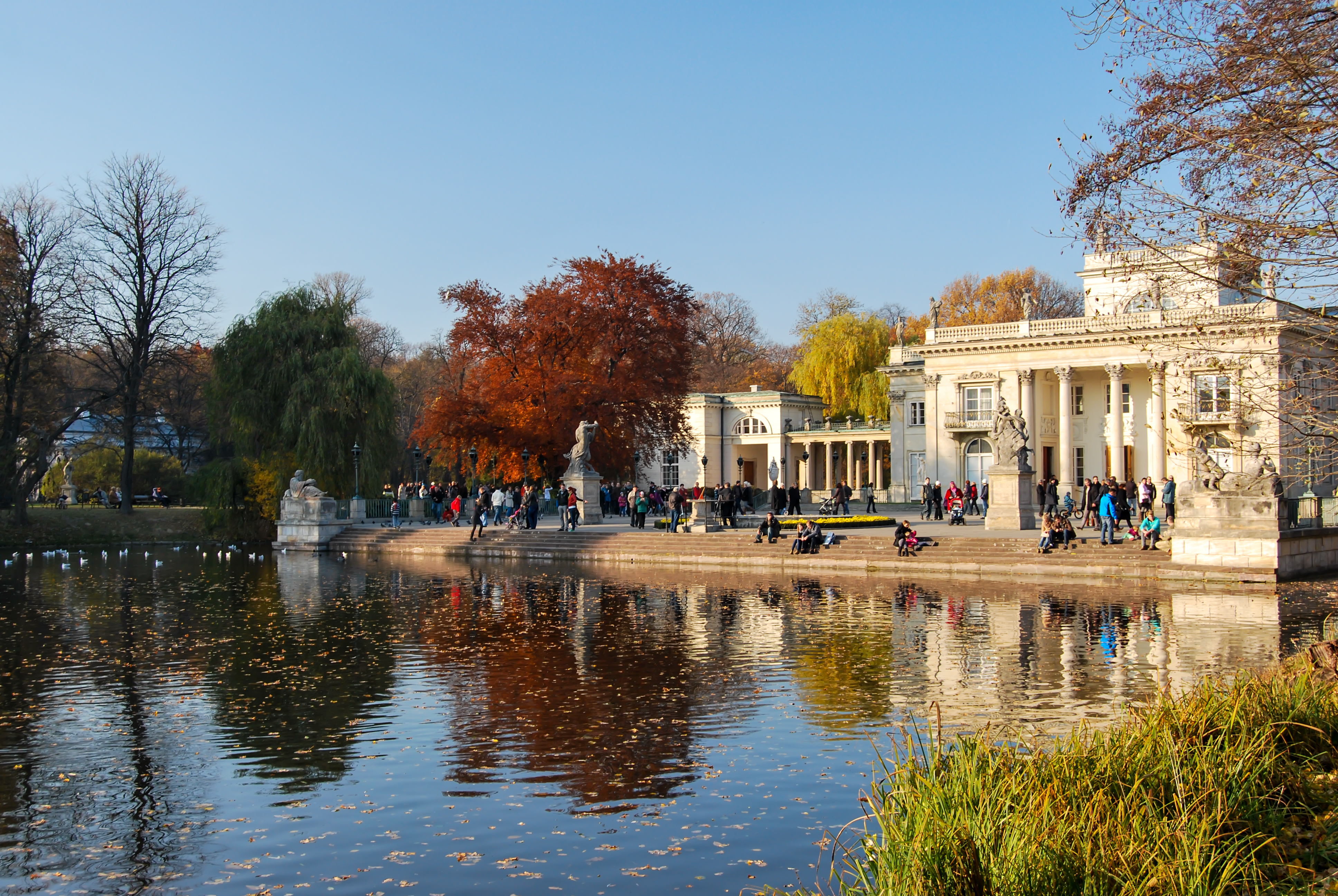 Warszawa, Pałac na Wodzie, 1683-1690, 1773 1784-1788, 1793